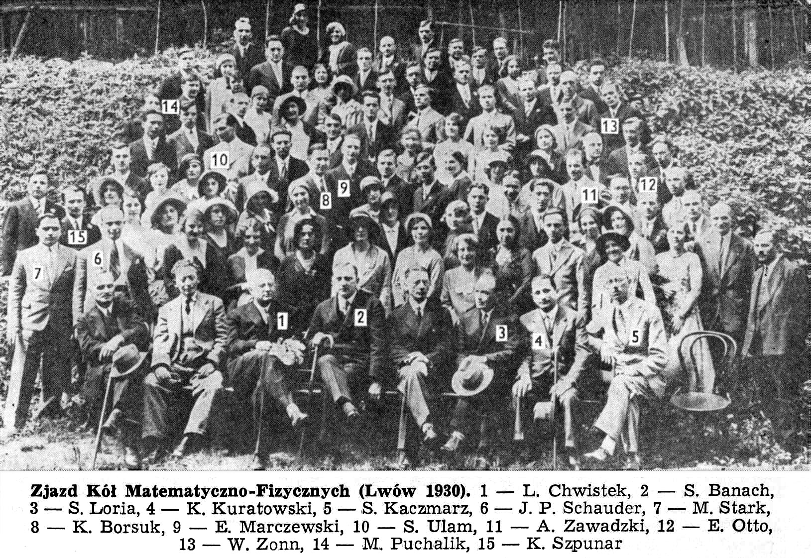 Lwowscy matematycy AD 1930 Fotografia pochodzi z książki Kazimierza Kuratowskiego "Pół wieku matematyki polskiej 1920-1970" wydanej przez Książkę i Wiedzę w 1973 r. (bez zastrzeżonych praw autorskich).